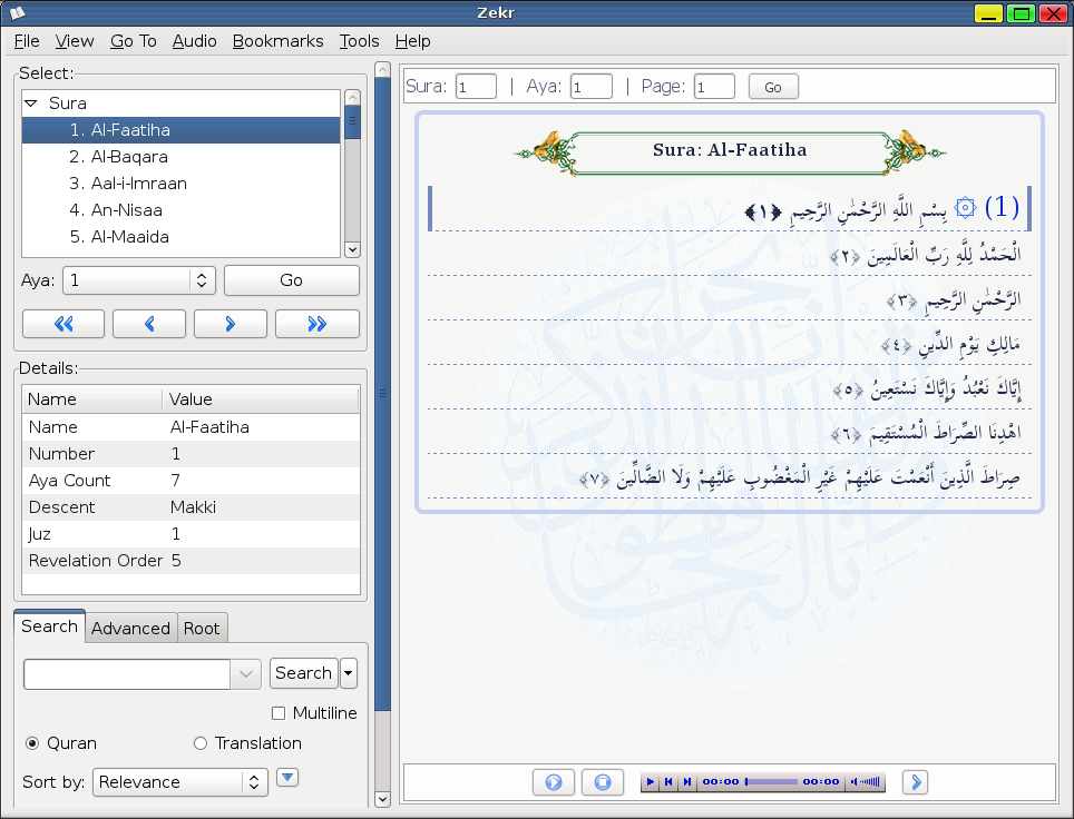 screenshot of zekr program